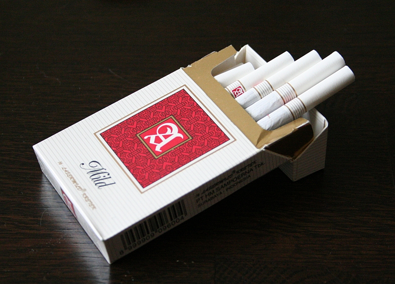 Kretek cigarettes, Sampoerna A-Mild